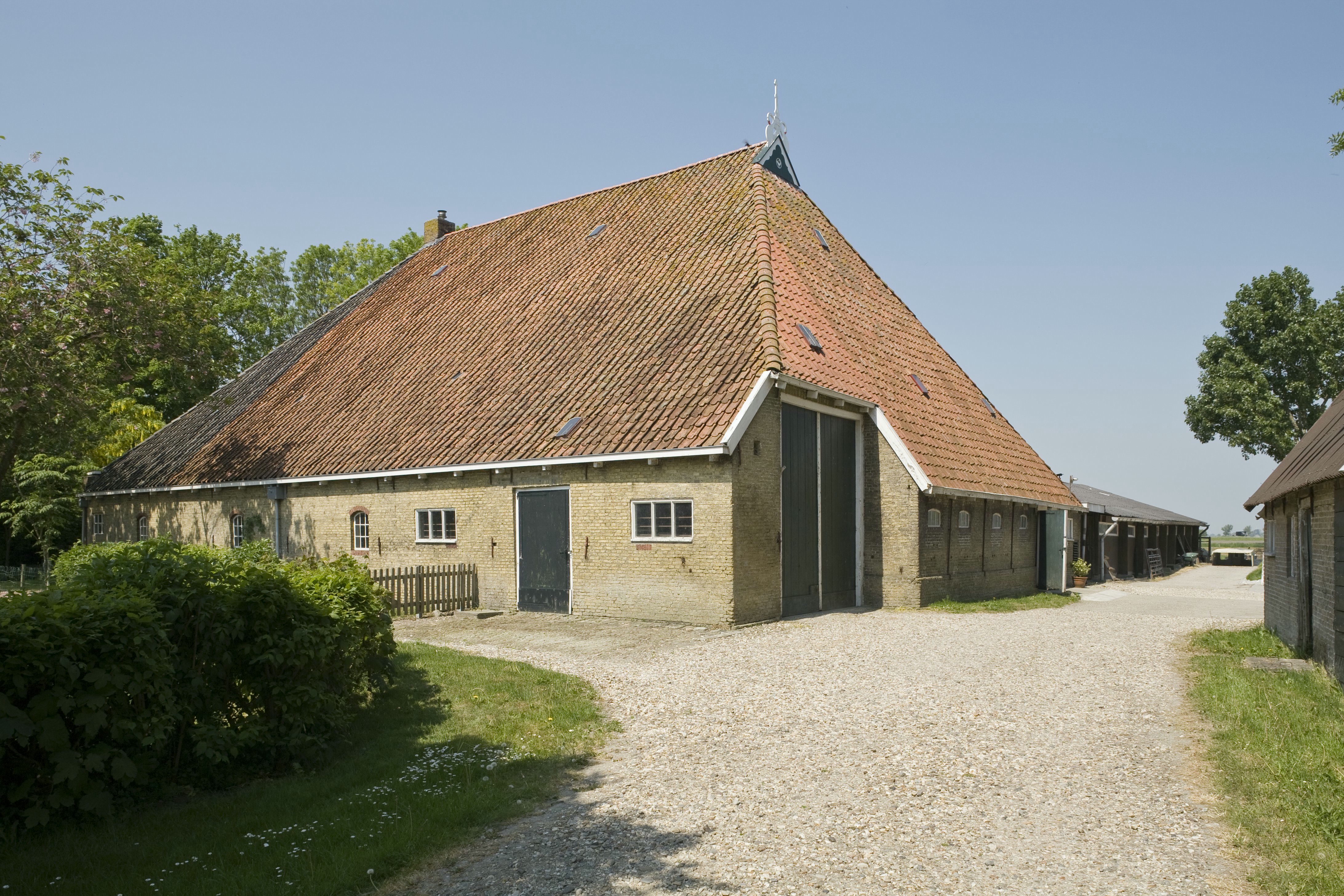 Boerderij: Overzicht van de schuur (opmerking: Project RRWR)